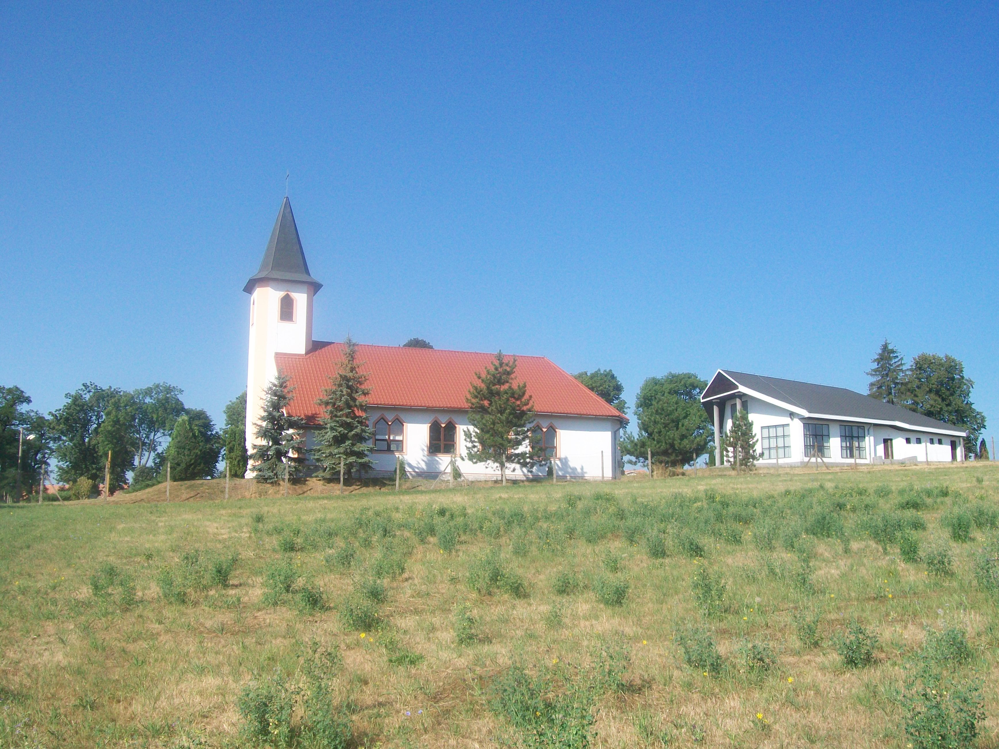 Dom smútku a katolícky kostol v obci Kalinovo